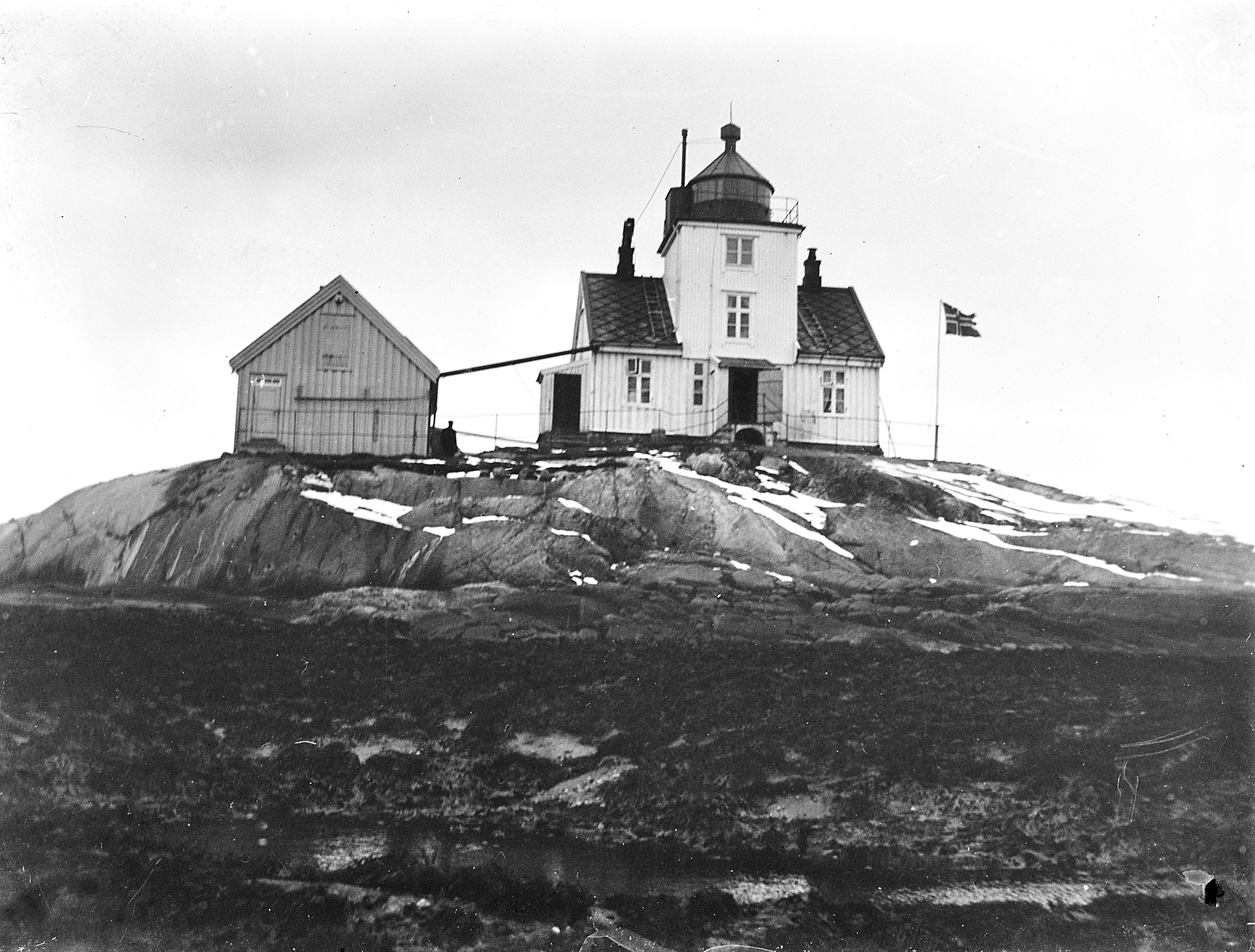 Bildet er hentet fra Arkivverket. Støtt, Meløy Arkivinstitusjon : Riksarkivet Arkivnavn : Fyrdirektoratet Sted : Norge, Nordland, Meløy, Støtt Emneord: Fyr, Kyst Avbildet